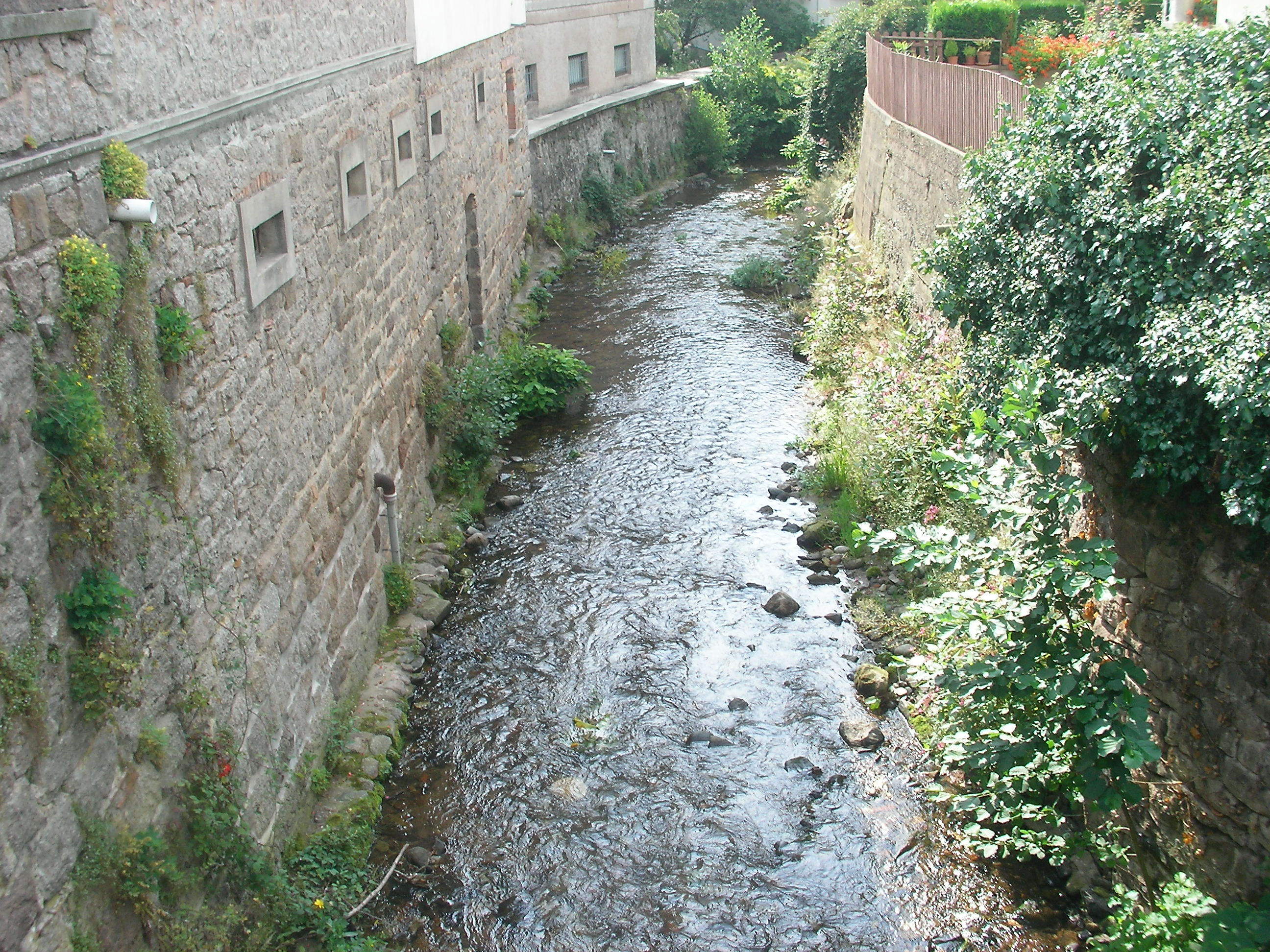 Rivière à Andlau (Bas-Rhin, France).